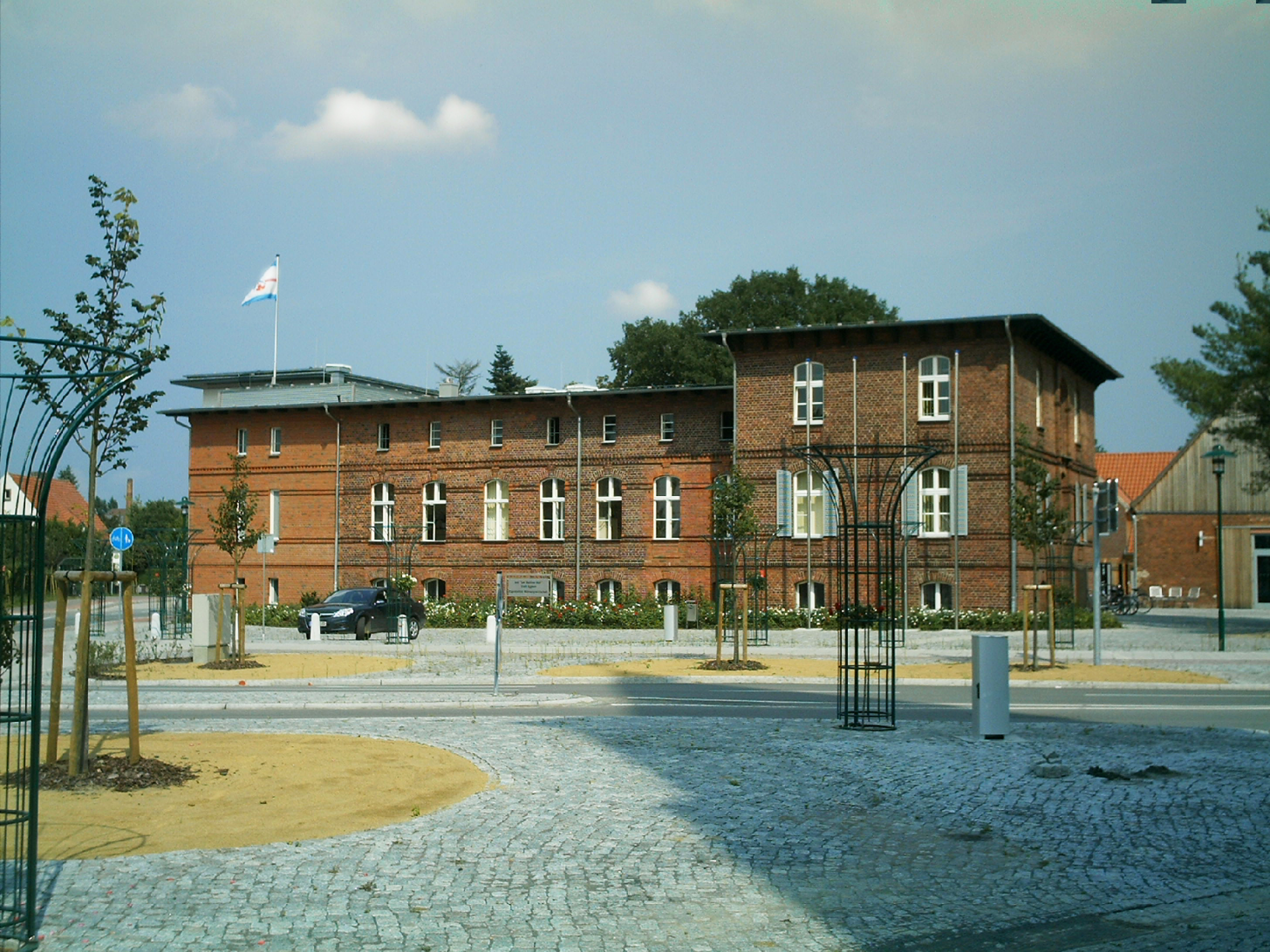 der neugestaltete Rosengarten im Zentrum der Stadt Eggesin